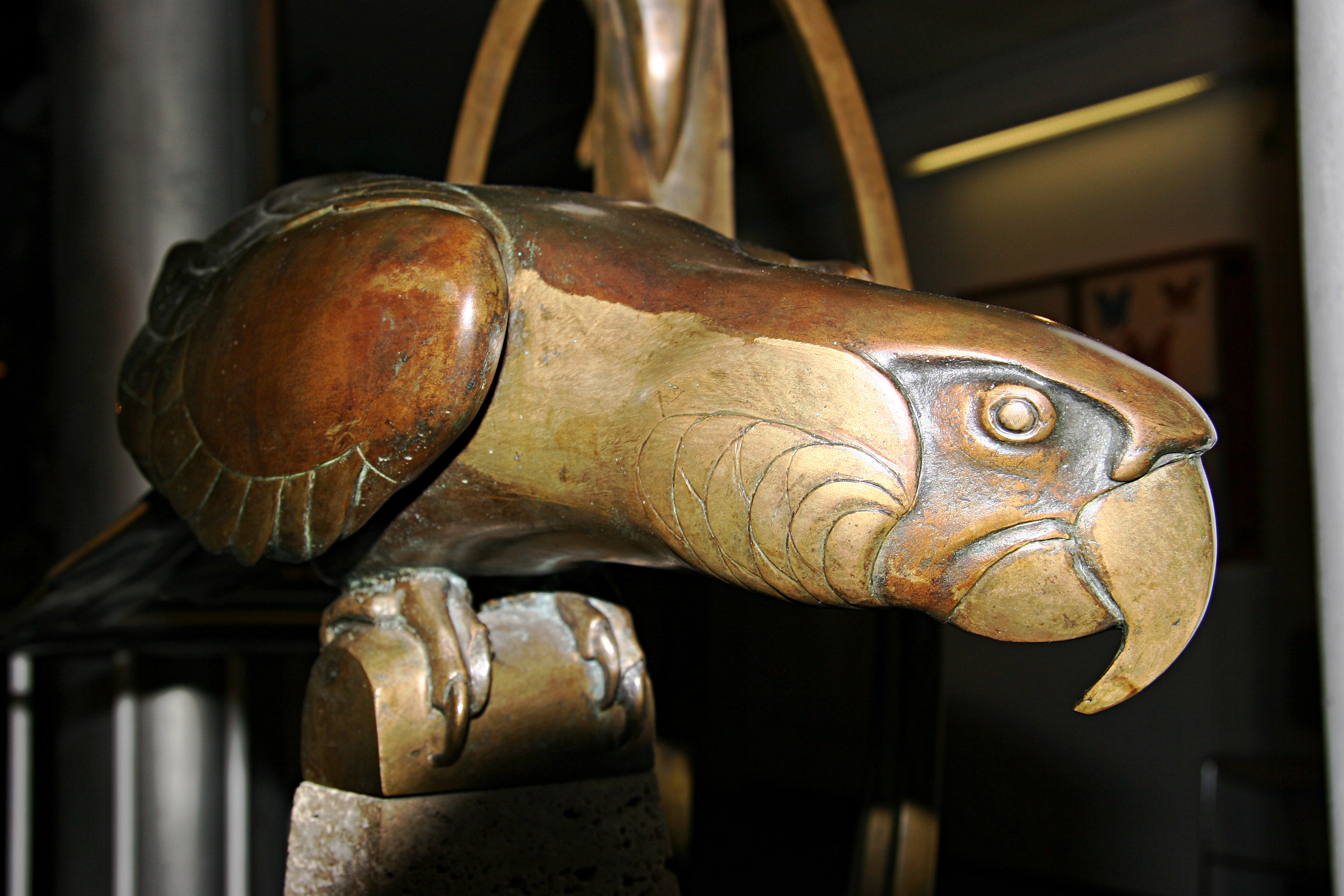 Bronzeplastik von Wilhelm Krieger